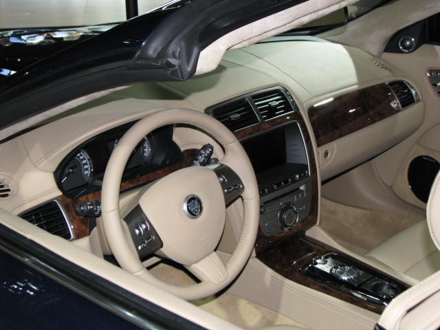 Interior del Jaguar XK 5.0 V8 convertible en el Salón Internacional del Automóvil de Barcelona 2009.